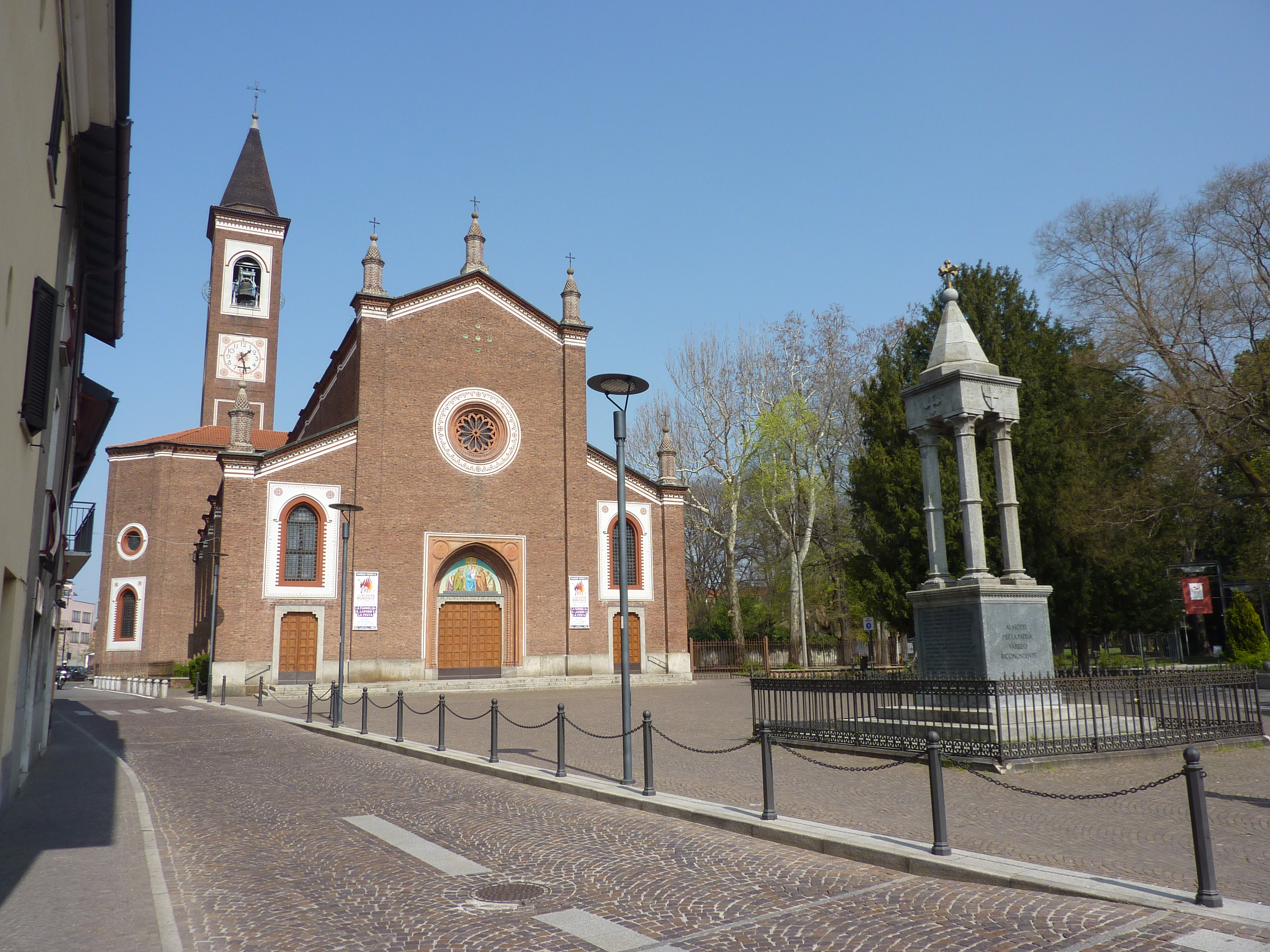 Piazza parrocchiale di Varedo